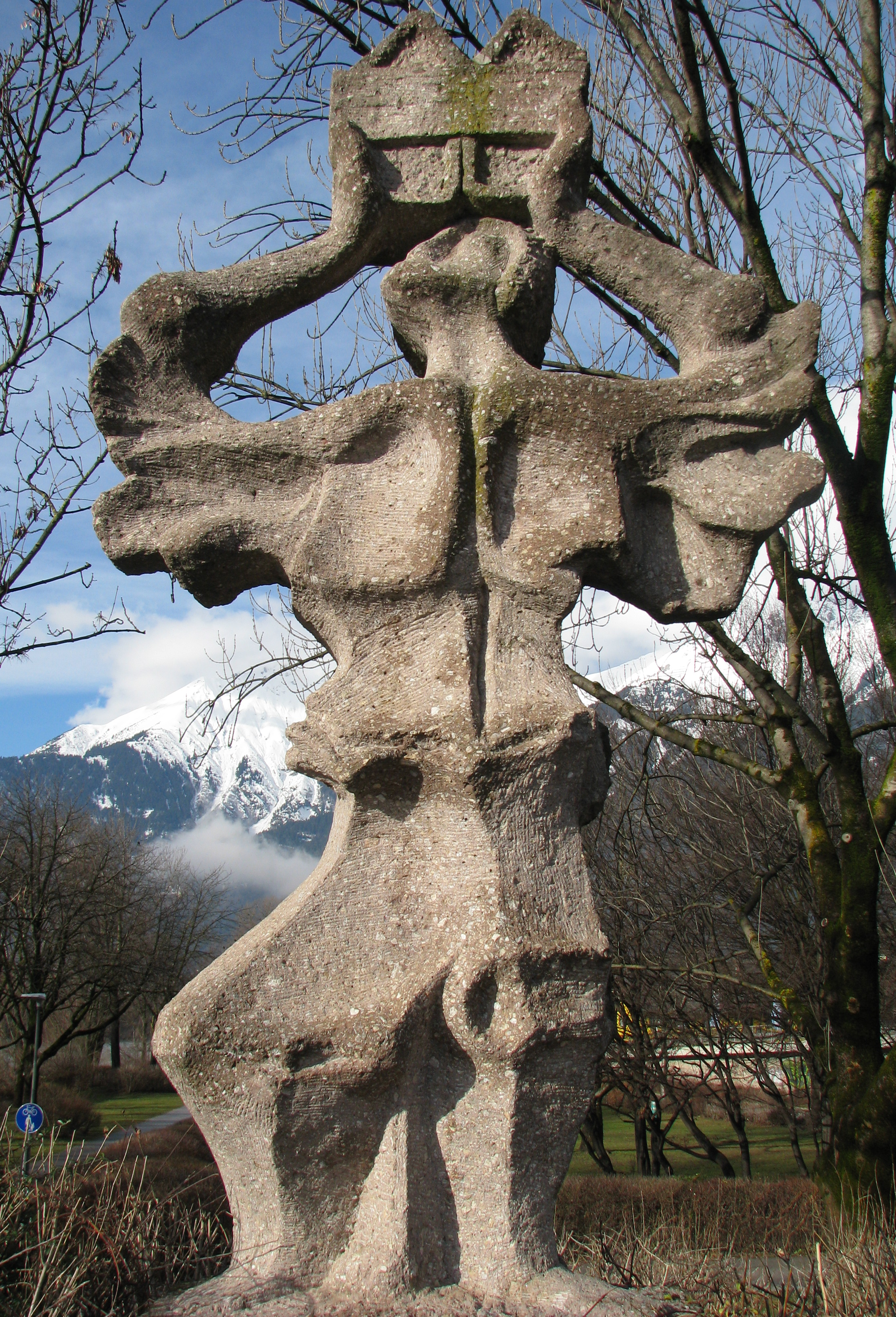 Stadtengel, Kunststeinskulptur von Erich Keber am nördlichen Brückenkopf der Grenobler Brücke, 1980